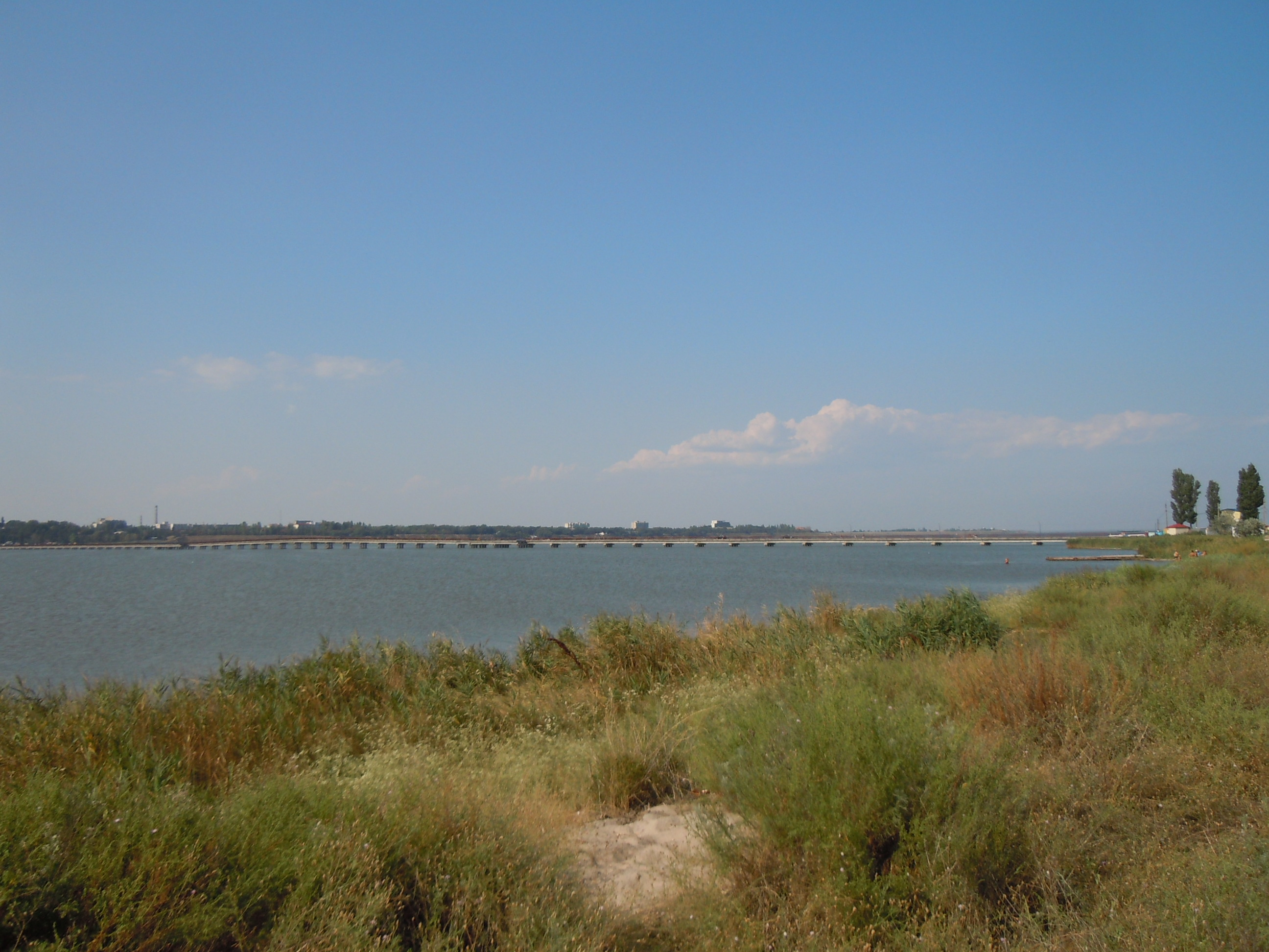 Вигляд на міст, що поєднує Сергіївку із косою